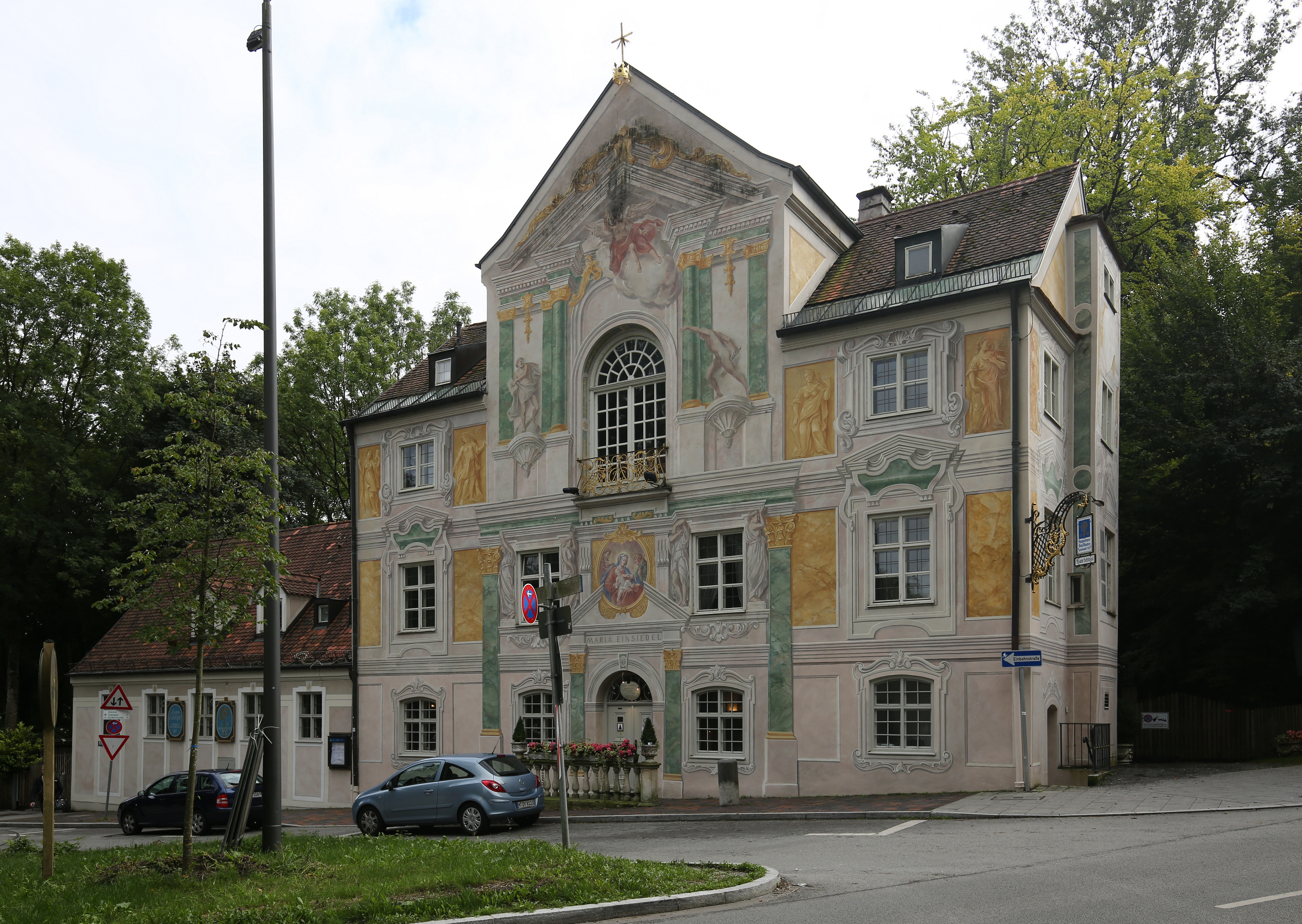 Asam-Schlössl in München-Thalkirchen. Erweitert und ausgeschmückt durch Cosmas Damian Asam mit Geldern, die er mit der Ausmalung der Klosterkirche Maria Einsiedl in der Schweiz verdient hat. Daher auch als Maria Einsiedl bekannt.